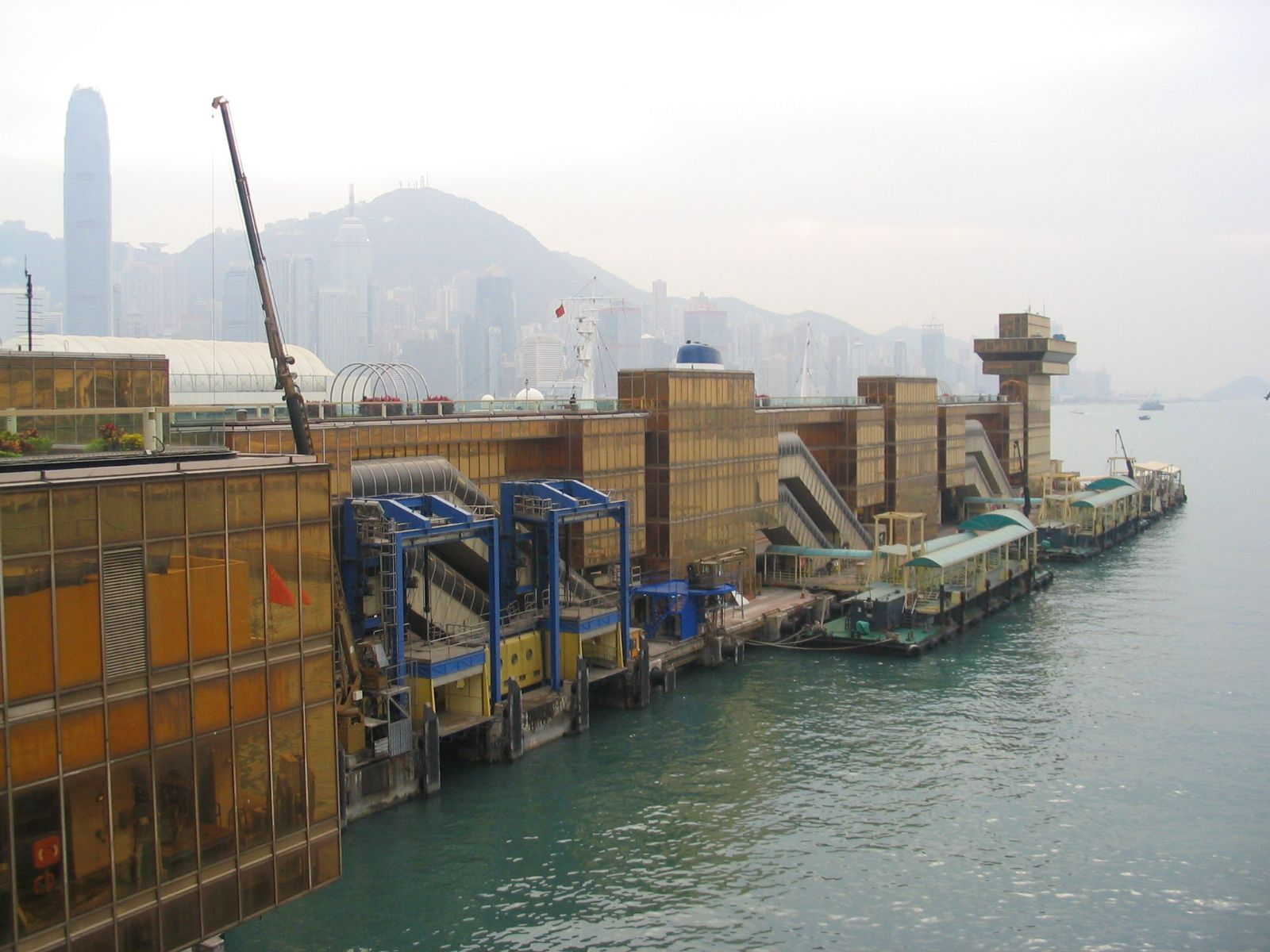 中港城-中國客運碼頭(中港碼頭) Hong Kong China Ferry Terminal, China Hong Kong City